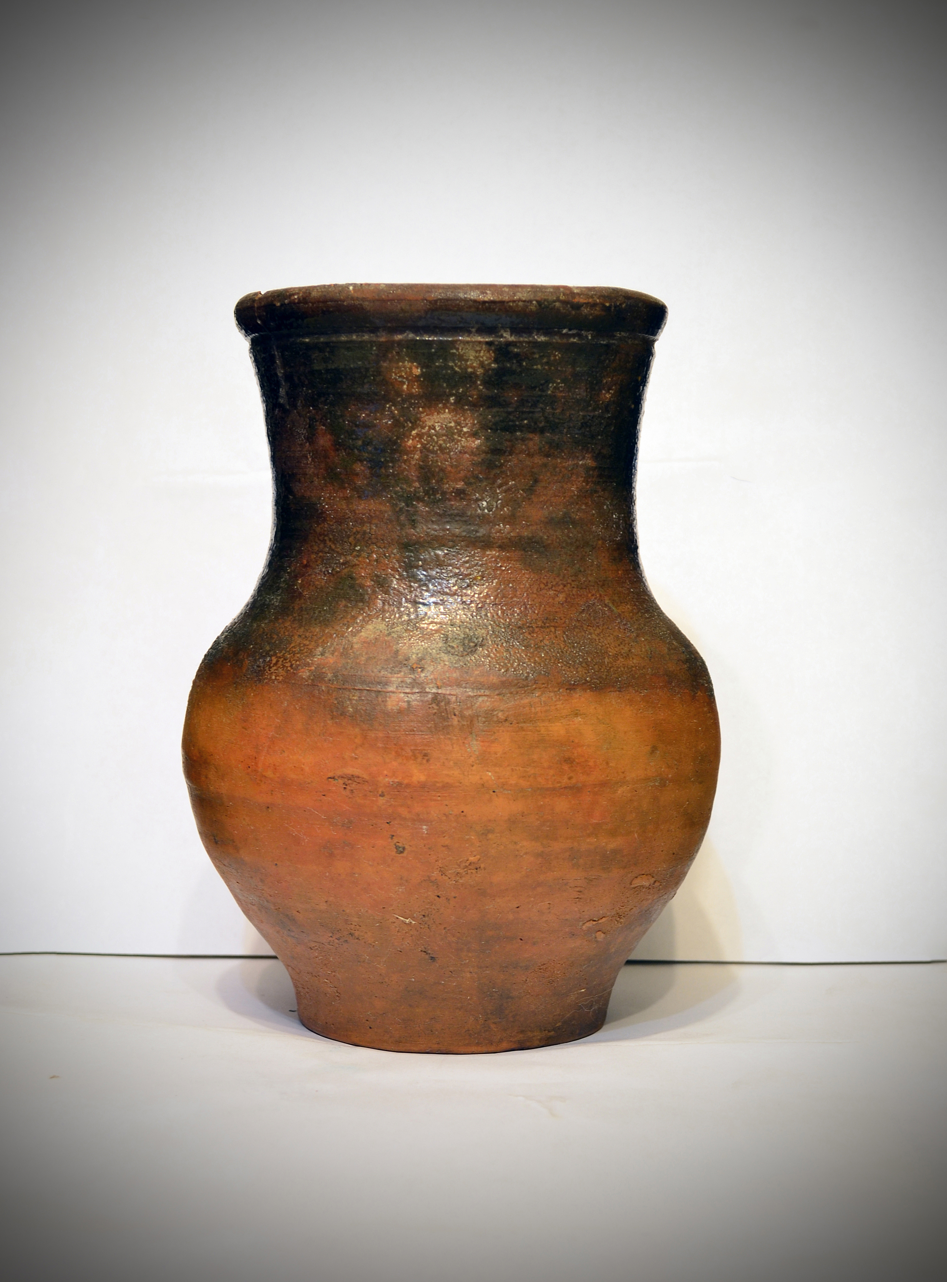 Крынка,Рязанская губерния,19 век.